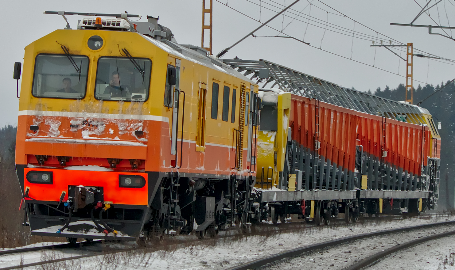 Тепловоз (тягово-энергетическая секция) ТЭС ПСС1К в составе снегоуборочного поезда ПСС1К